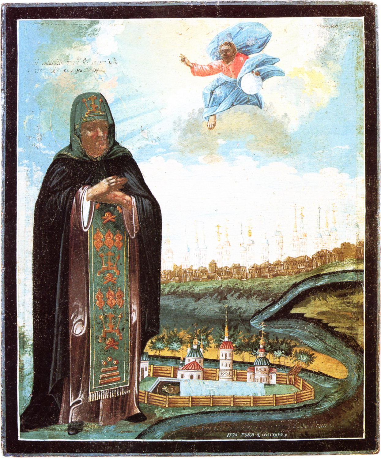 Икона XVIII века. Св. Феодосий Тотемский Место хранения: Тотемский краеведческий музей Размер: 31,4 x 26 см